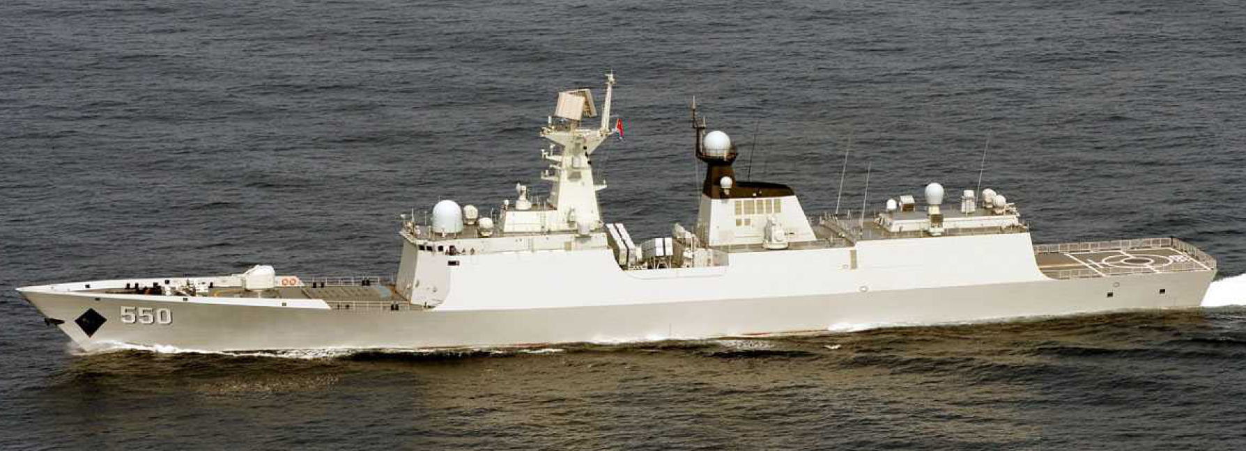 ５月２日（金）午後５時頃、海上自衛隊第１３護衛隊「じんつう」（佐世保）及び第５航空群所属「Ｐ－３Ｃ」（那覇）が、宮古島の北東約１３０ｋｍの東シナ海を南東進する中国海軍ジャンカイⅡ級フリゲート１隻及びダシン級練習艦１隻の合計２隻を確認した。